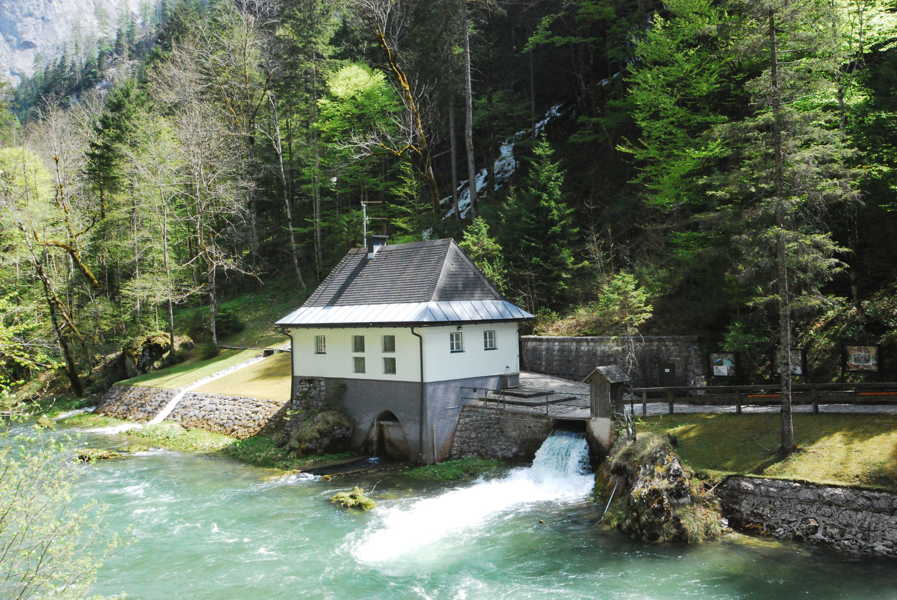 "Kläfferquelle" bei Wildalpen, Steiermark. Ergiebigste Karstquelle Mitteleuropas (max. 10qm/s). Auch: Kläfferbrünnequelle genannt. Diese Quelle im Tal der Salza ist mit einem 90m langen Stollen im Berg gefaßt und über eine Wasserleitung mit den Wiener Wasserwerken verbunden.